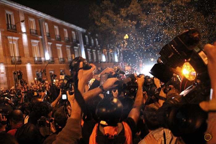 Imagen de la concentración del 25 de septiembre frente al Congreso de los Diputados en Madrid, España. Al final de la misma se produjeron cargas policiales incluso en la estación de Atocha